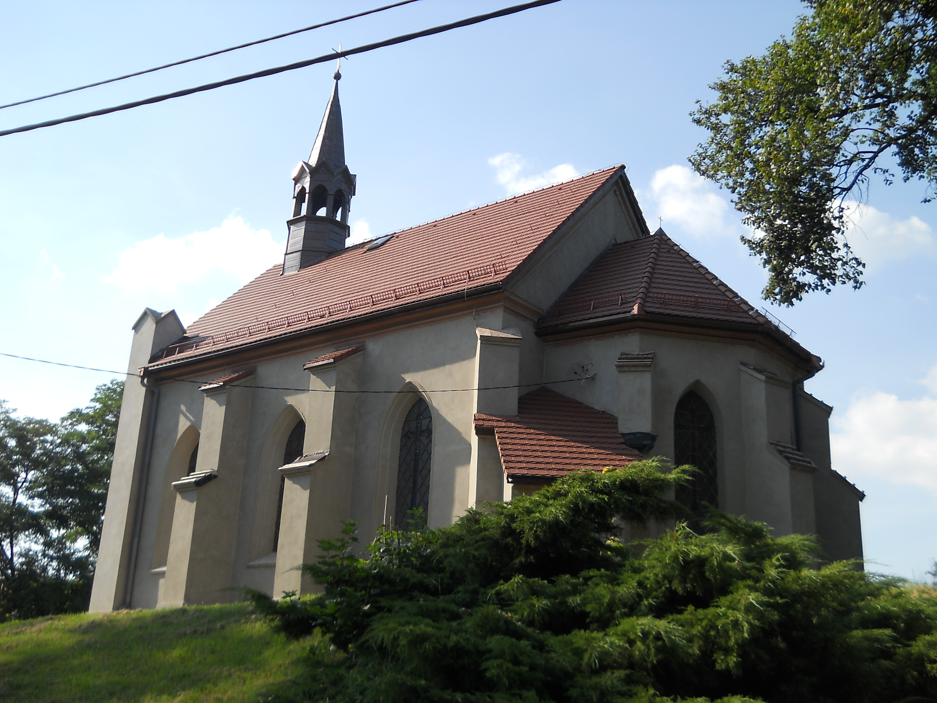 Pyskowice, ul. Armii Krajowej 15 - kościół pw. św. Stanisława Biskupa (zabytek nr A/331/11 z 18.02.2011)